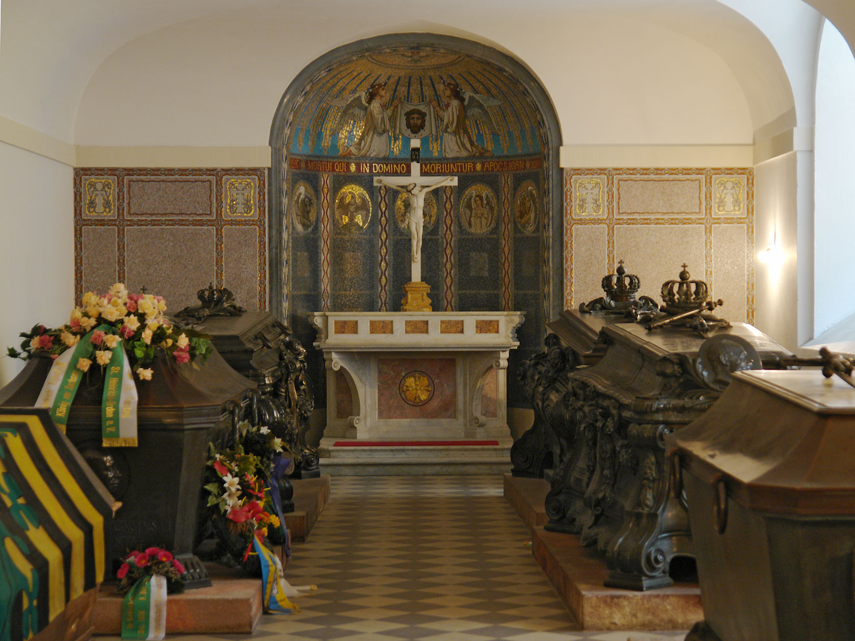 jüngster Gruftraum in der Hofkirche